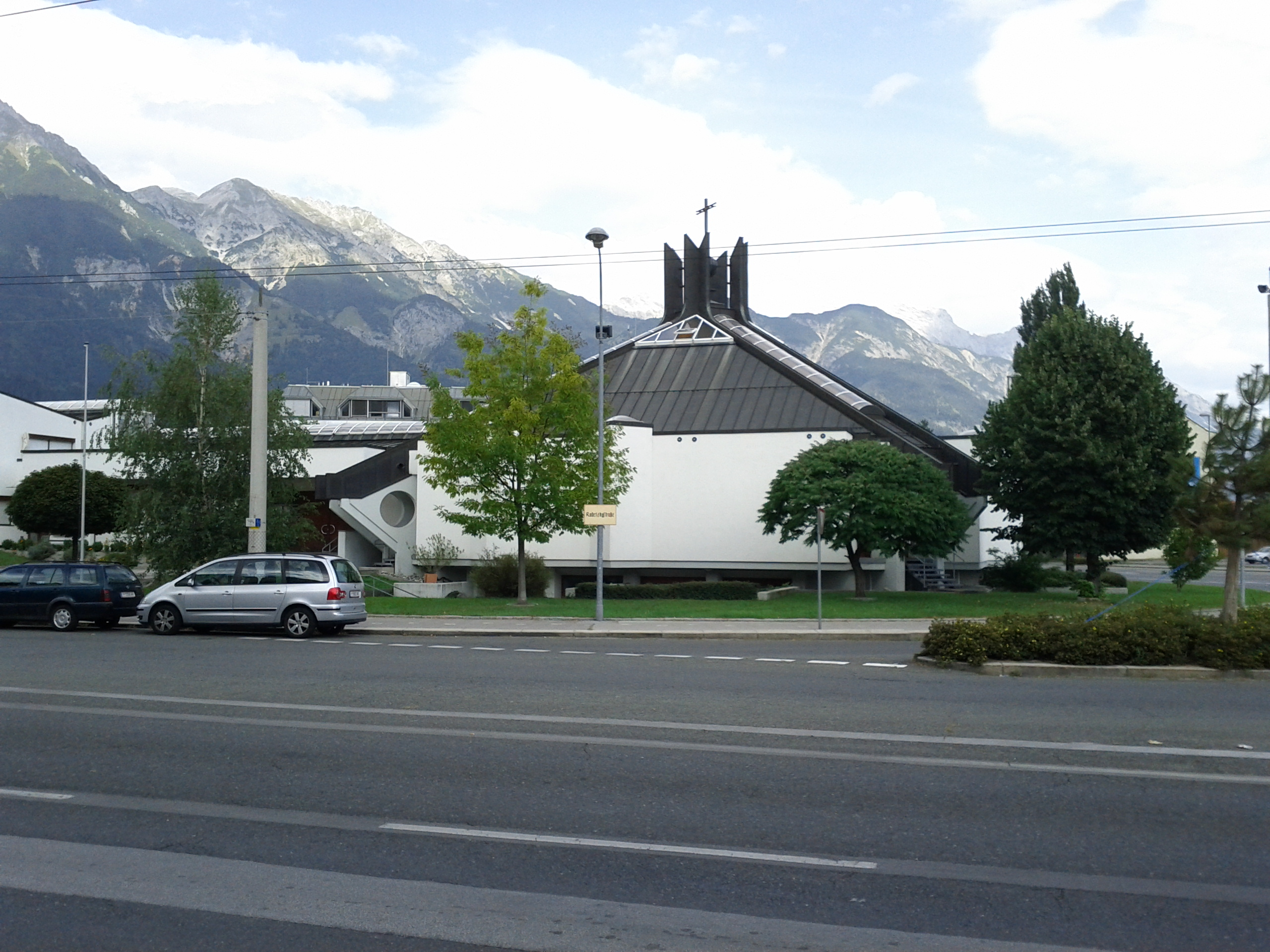 Kath. Pfarrkirche und Pfarrzentrum hl. Pirmin